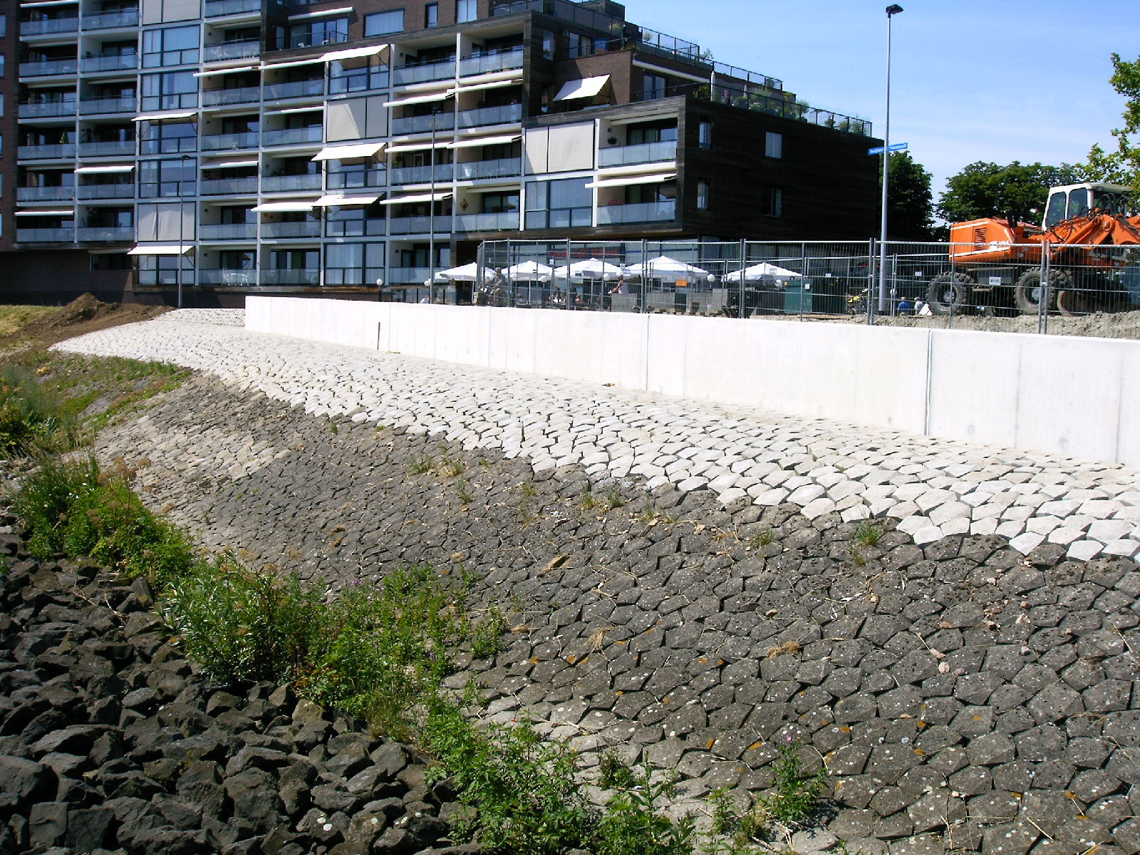 Basaltonglooiing die met de hand gezet is, oevervoorziening bij het veer in Papendrecht langs de Merwede.